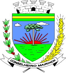 Brasão do Municipio de Conselheiro Mairinck - PR